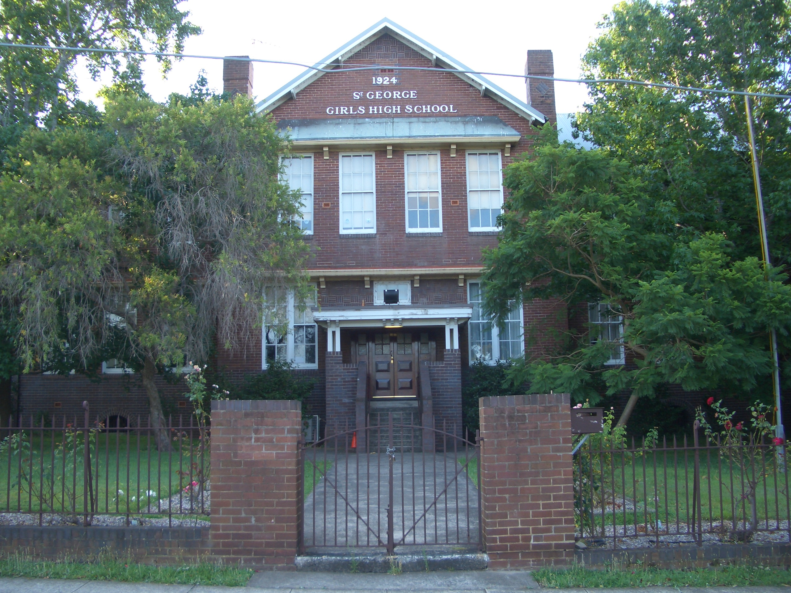 Kogarah, St George Girls High School